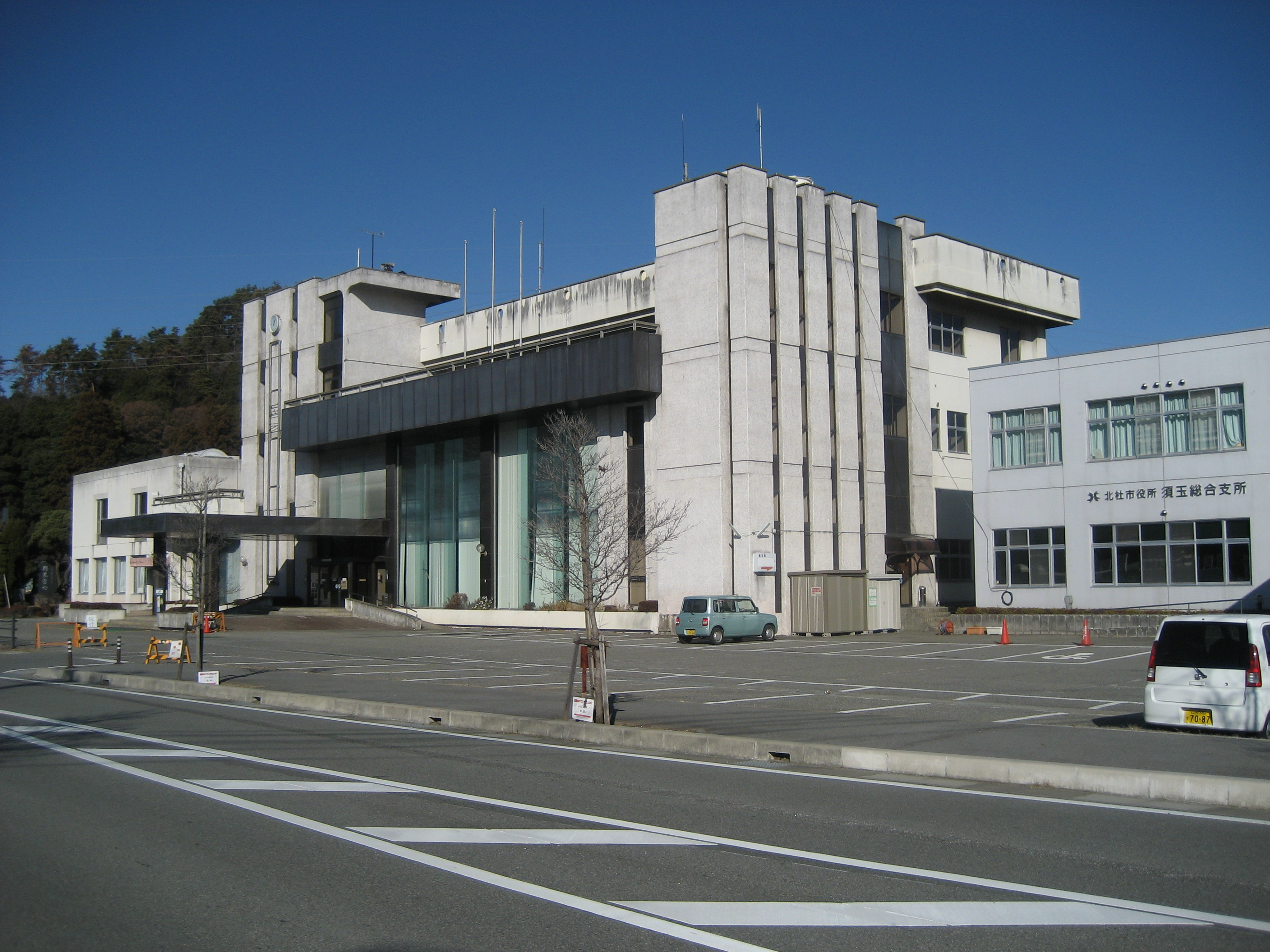 山梨県北杜市役所須玉総合支所庁舎（旧須玉町役場）